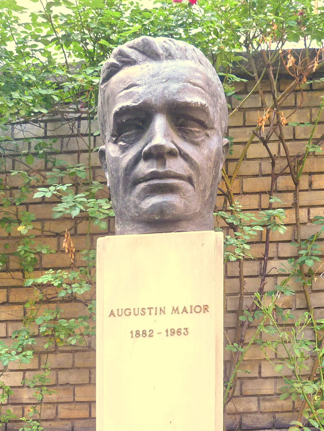 Bustul lui Augustin Maior din "Parcul Memoriei Universitare" în curtea Universităţii Babeş-Bolyai Cluj-Napoca, România.